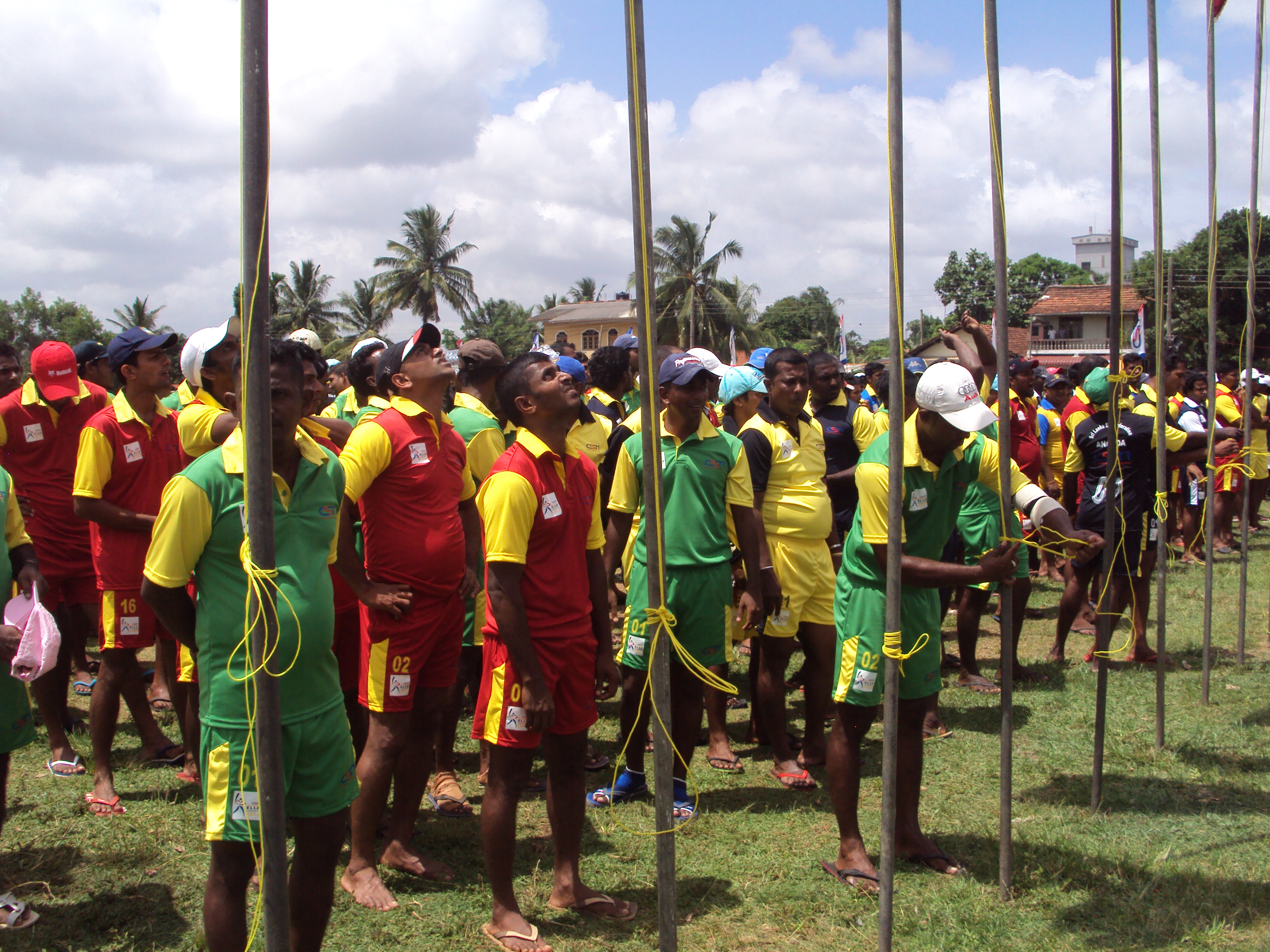 සිංහල: එල්ලේ තරගයක ආරම්භයක උත්සවයක්